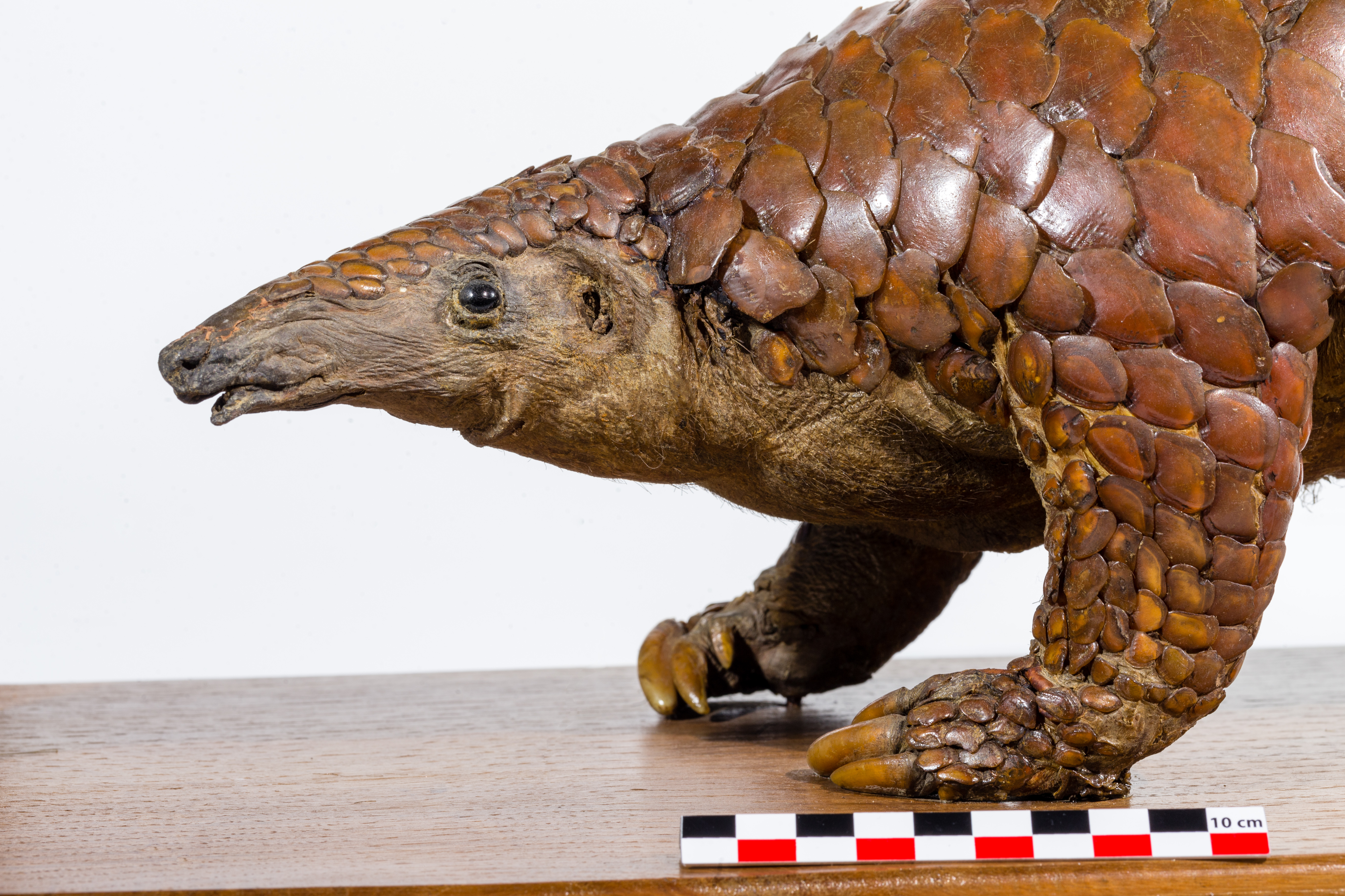 Pangolin à courte queue, naturalisation, entier sur socle.